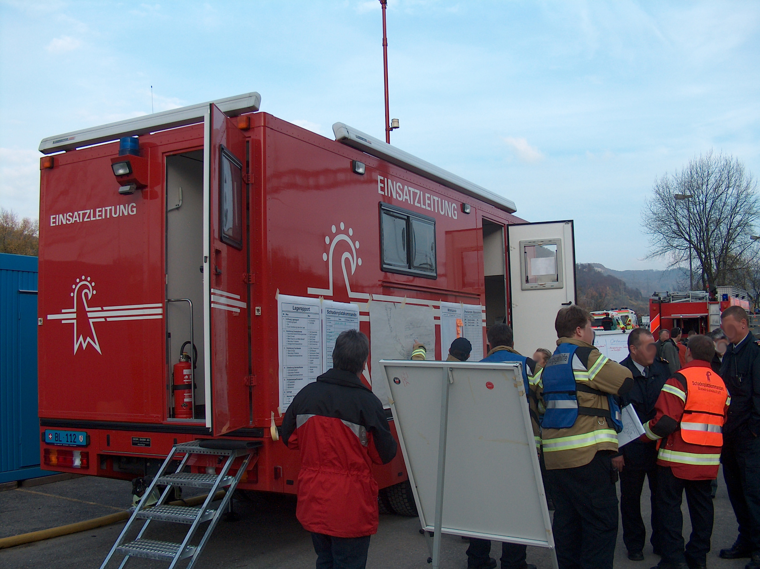 Einsatzleitungswagen des Katastrophenschutzes Basel-Landschaft und Einsatzleitungsbesprechung an der Hauptübung "Senza Limiti" der Stützpunktfeuerwehren Liestal und Sissach, der Feuerwehr Lausen, der Betriebswehr der SBB, der Chemiewehr und des Katastrophenschutzes, in Lausen, Höhe alter Bahnhof/Güterterminal. Ganz rechts Schadenplatzkommandant (Einsatzleiter), links davon zwei Führungsgehilfen